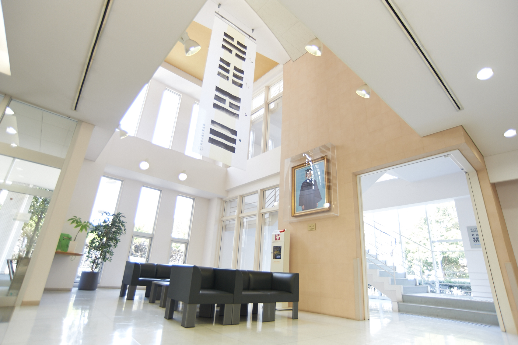 関東鍼灸専門学校のエントランスロビー